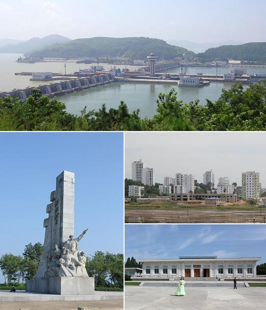 朝鮮南浦市的蒙太奇。